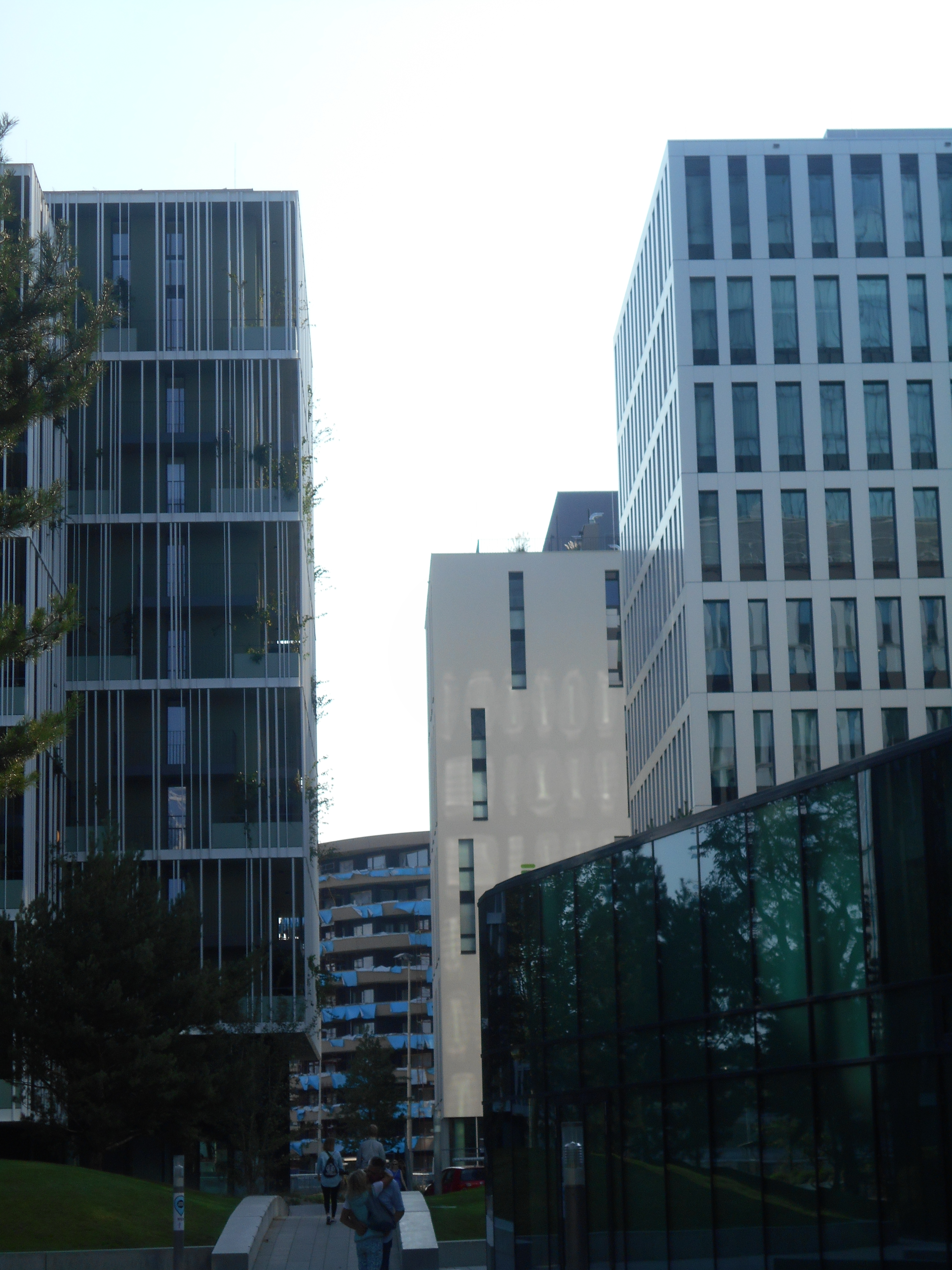 Der Straßenzug Am Grünen Prater mit den 2017 errichteten Teilen des "Viertel Zwei"